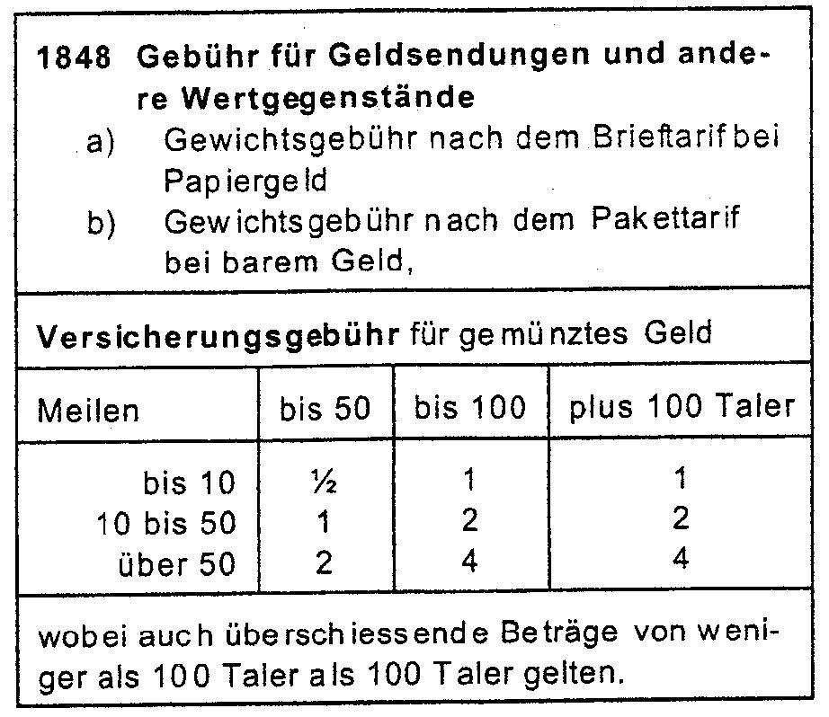 1848 Änderungen in den preußischen Tarifen